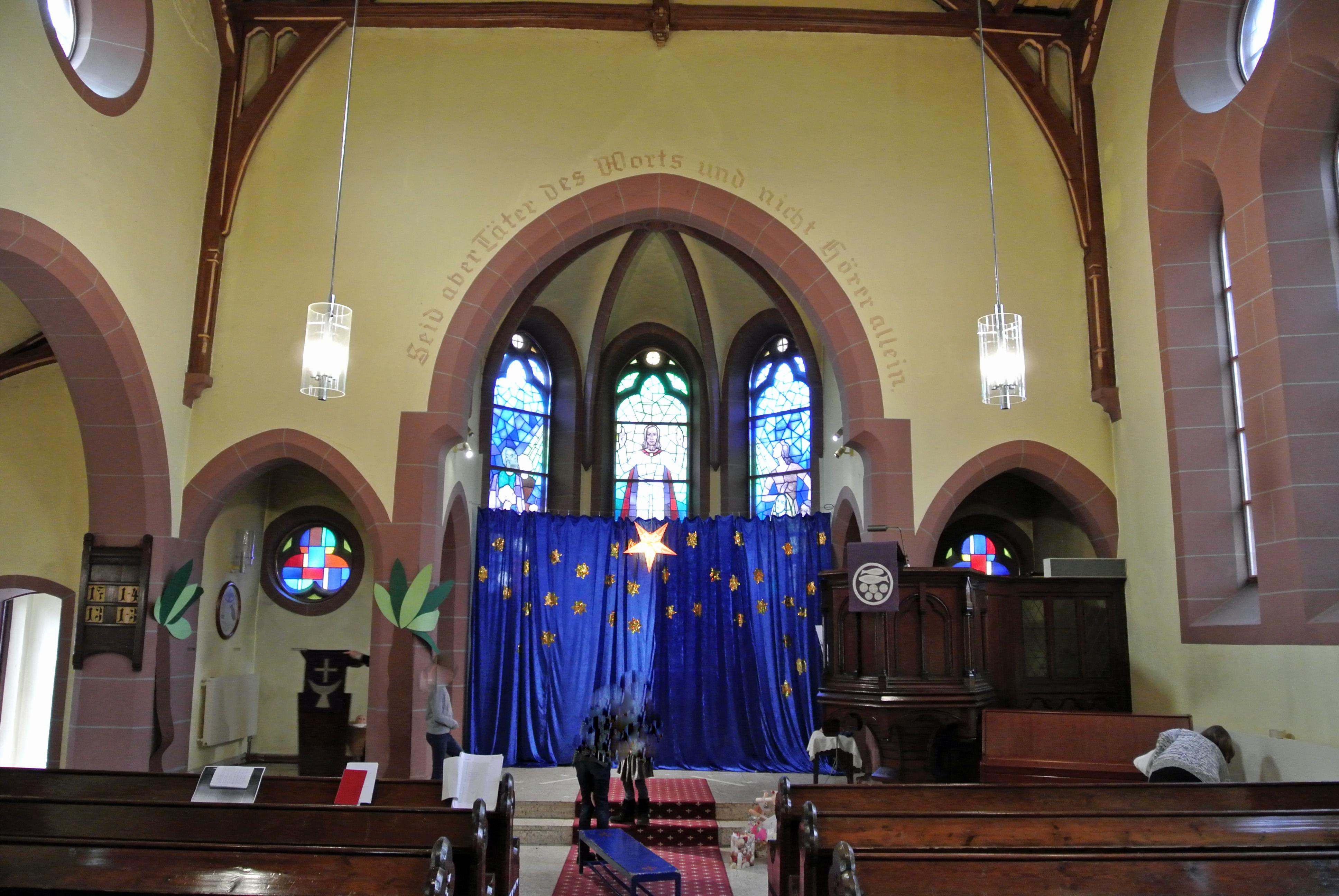 Evangelische Kirche in Frankfurt-Sossenheim, Siegener Straße 19; Baujahr: 1897; Baudenkmal; Altarraum